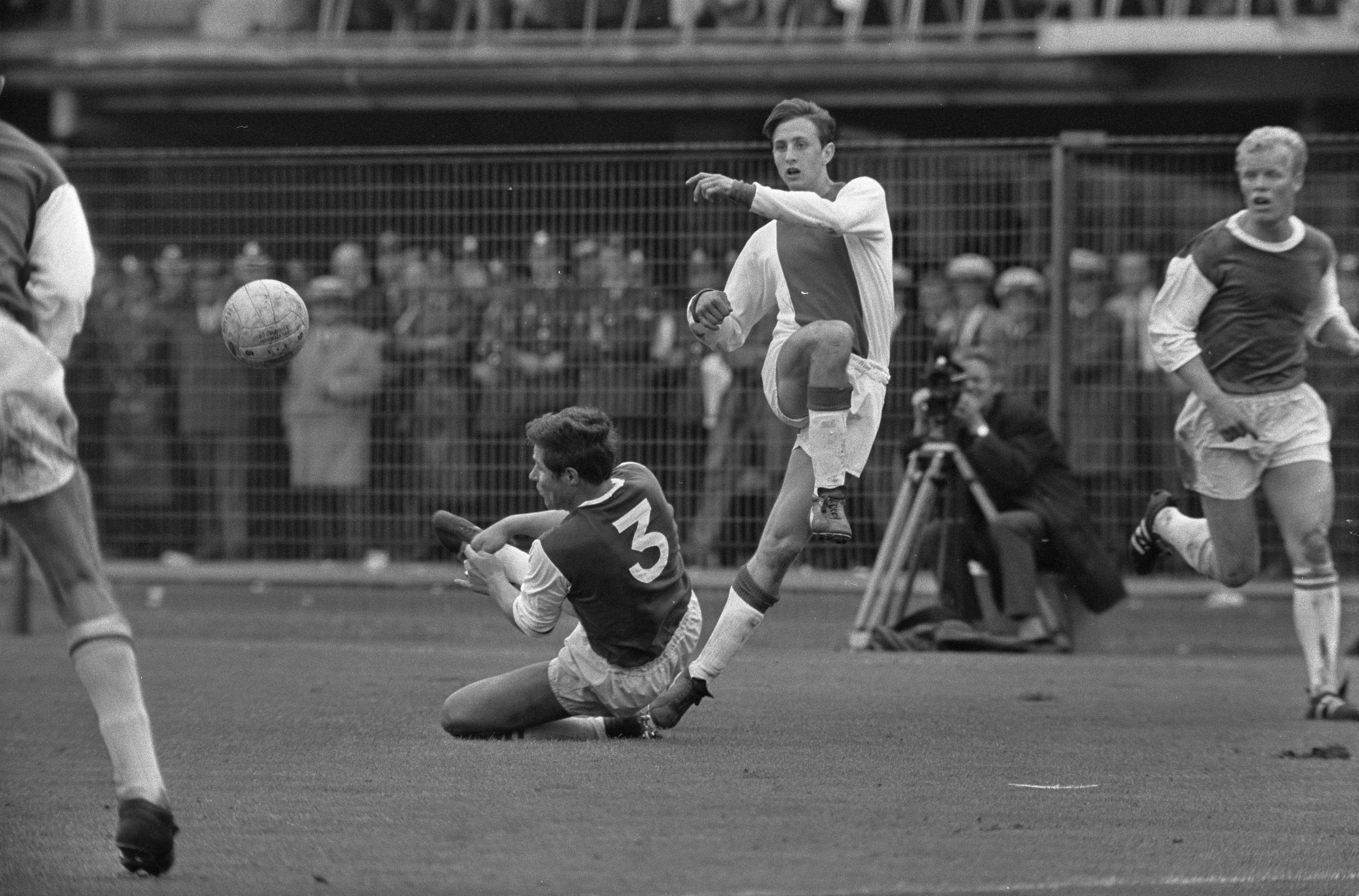 Feyenoord tegen Ajax 1-0. Nummer 26 Israel in duel met Cruyff